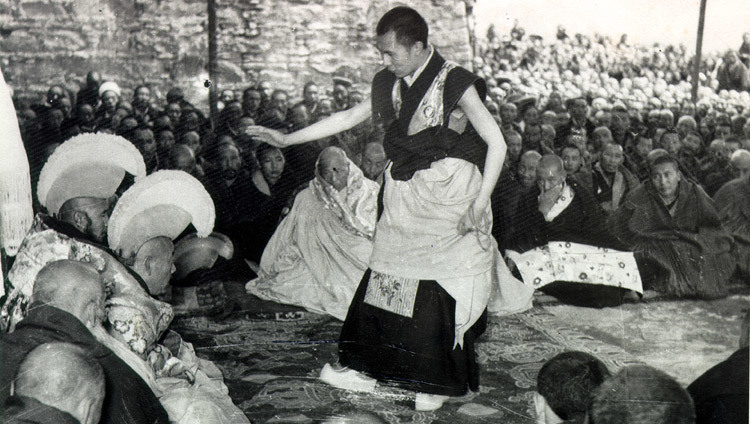 Sa Sainteté lors de ses examens finals de Guéshé Lharampa qui eurent lieu à partir de l’été 1958 jusqu’au mois de février 1959 à Lhassa, au Tibet (photo/OHHDL)